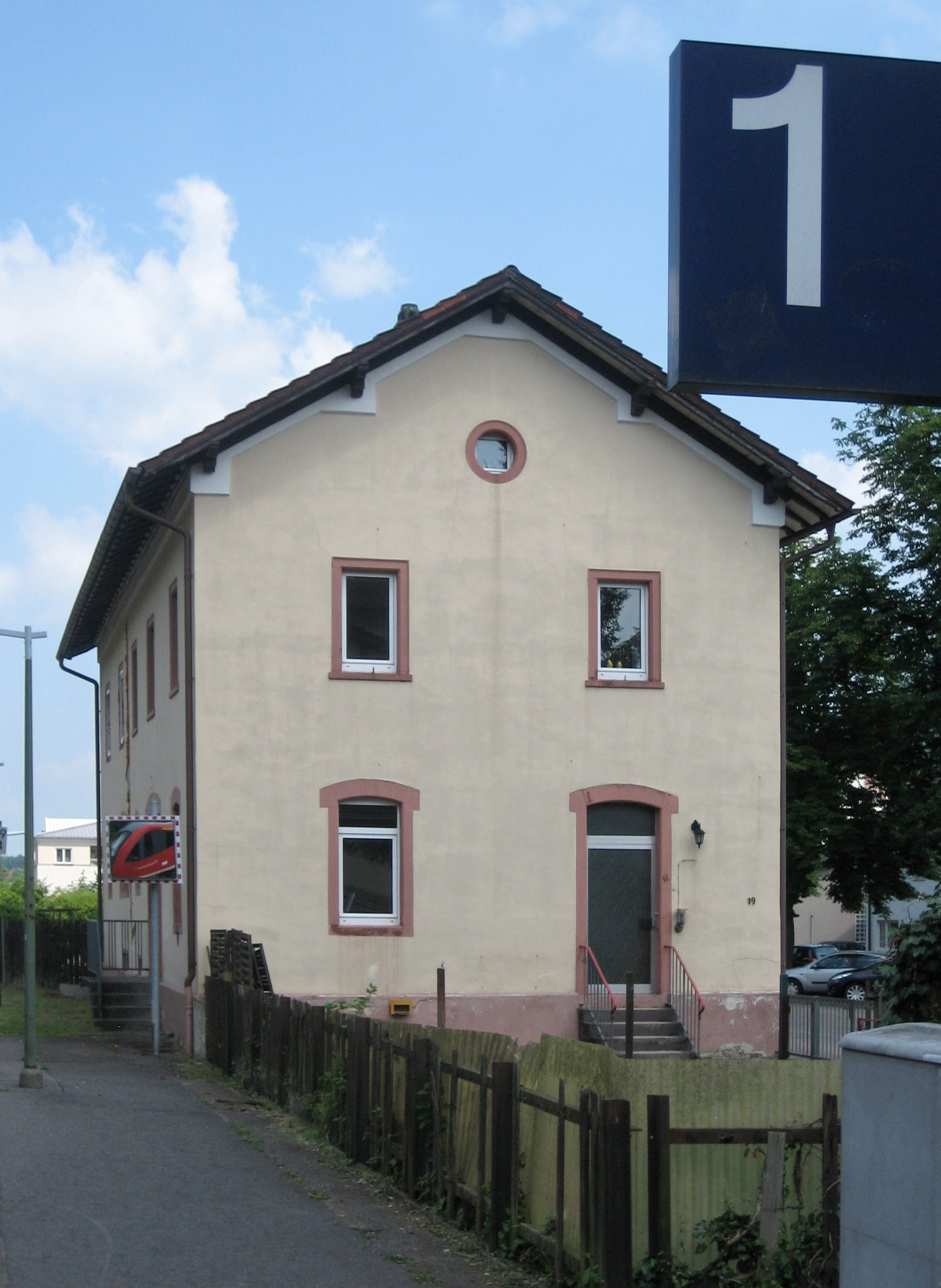 Früheres Nebengebäude des Bahnhof Annweiler am Trifels